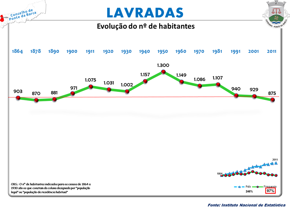 Censos 1864/2011